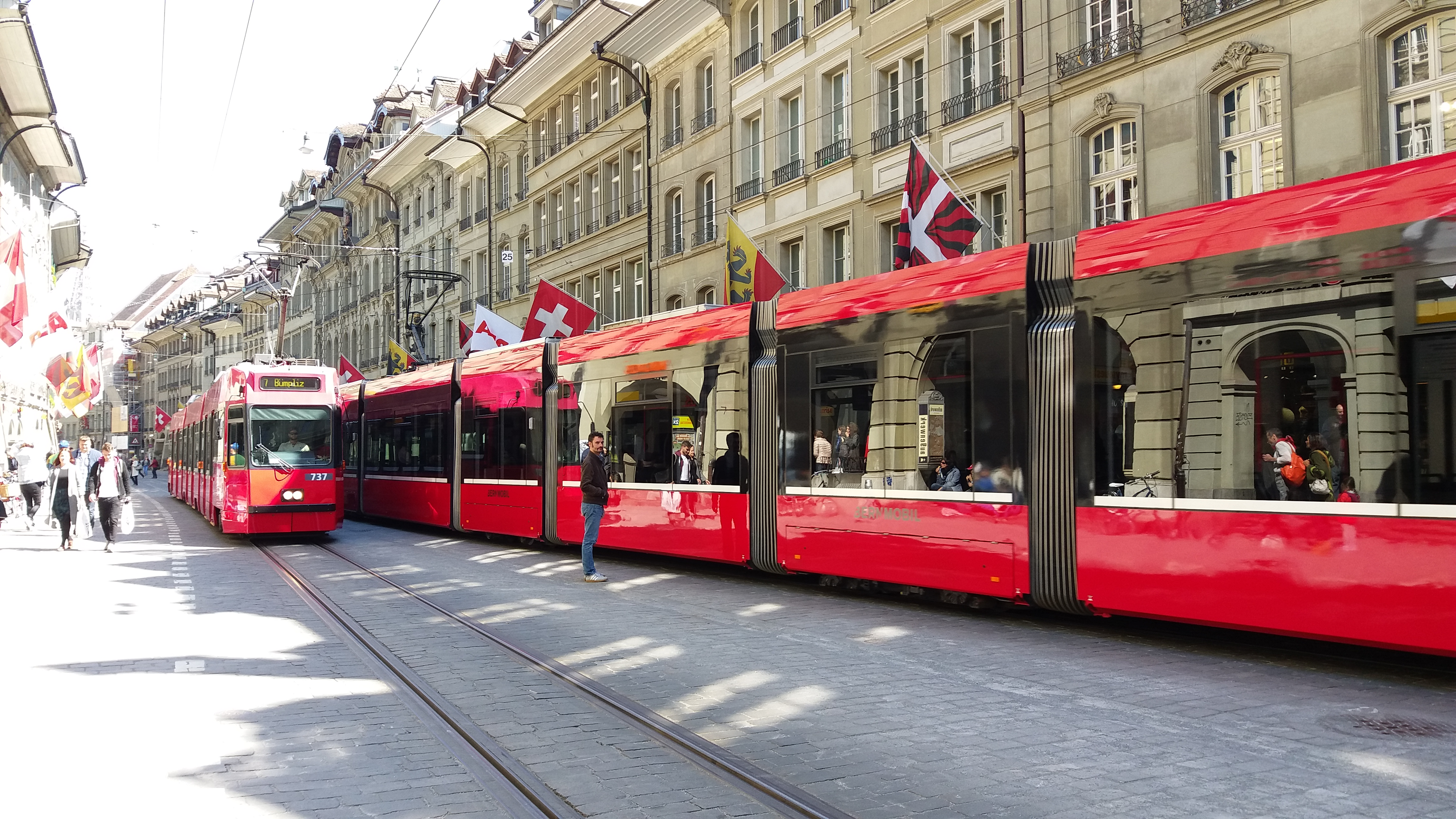 Berne Suisse Croisement de tramways dans Marktgasse, rames de type Be 4/8 et Be 4/6